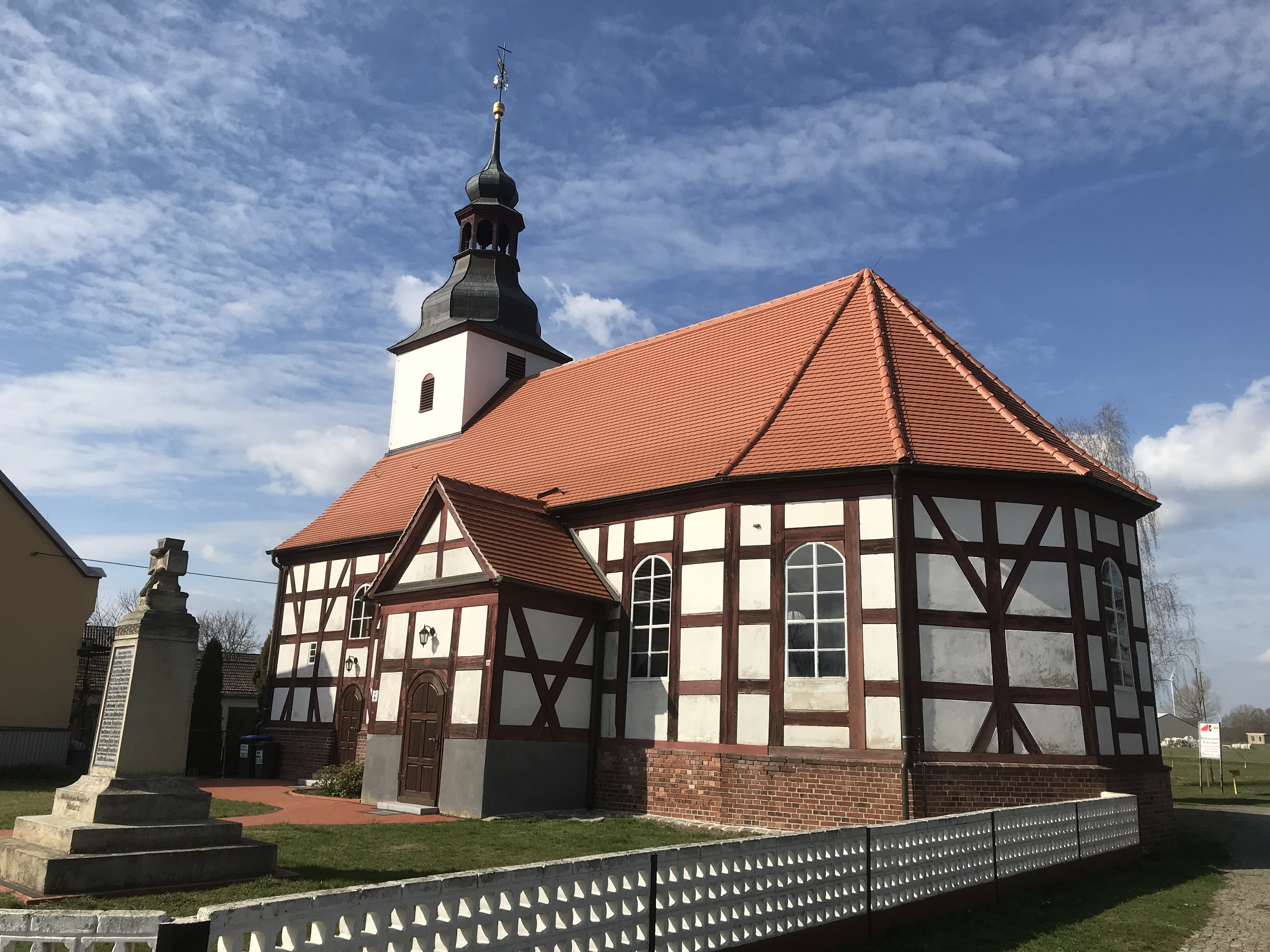 Die Dorfkirche Niewitz der Gemeinde Besteland im Landkreis Dahme-Spreewald in Brandenburg ist ein Fachwerkbau aus der Zeit um 1770.